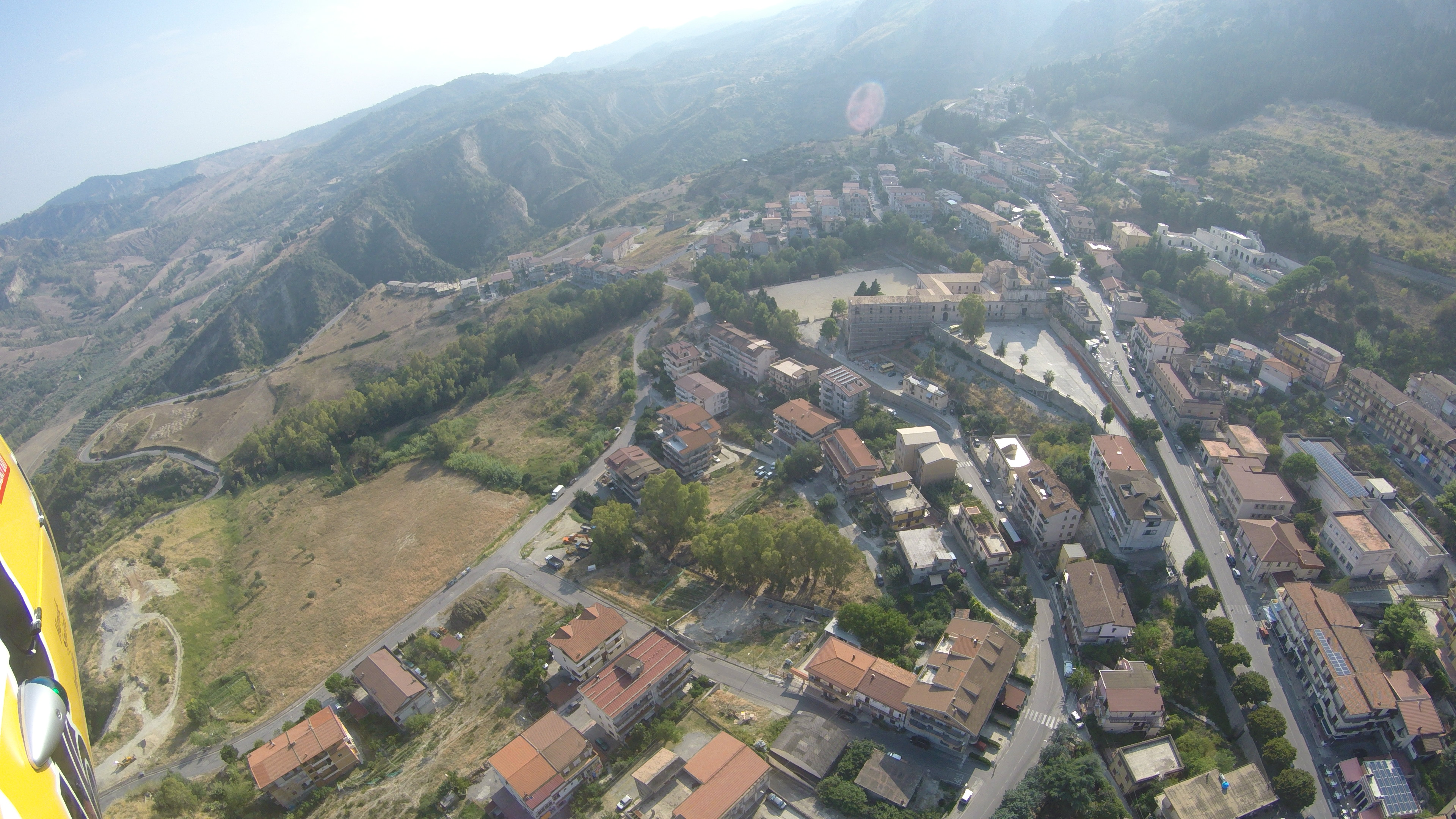 Stilo dall'alto con chiesa di San GIovanni Theresti (agosto 2016)